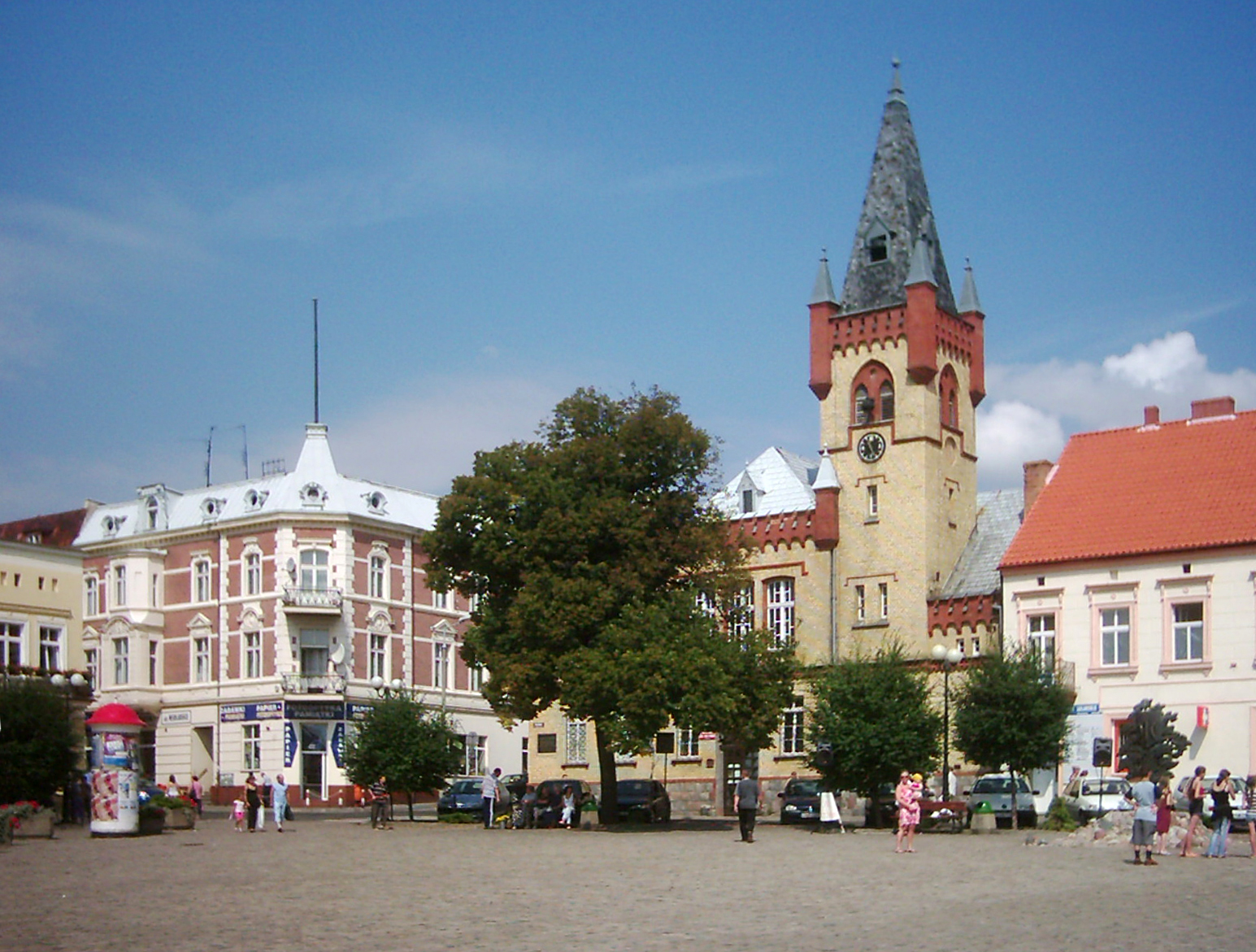 Ratusz w Świeciu w 2007 roku.